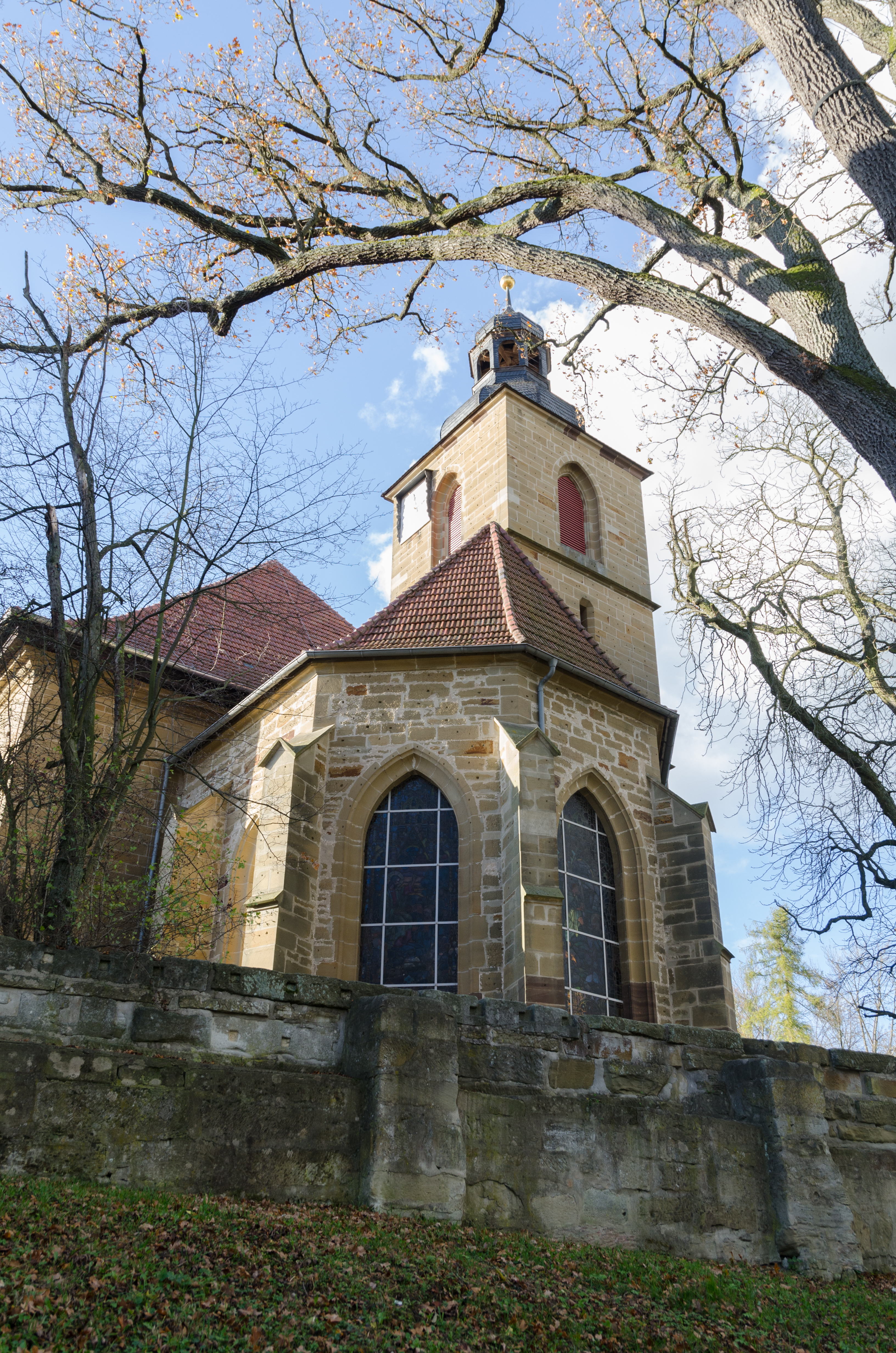 Bad Rodach, Stadtmauer, St. Johannis